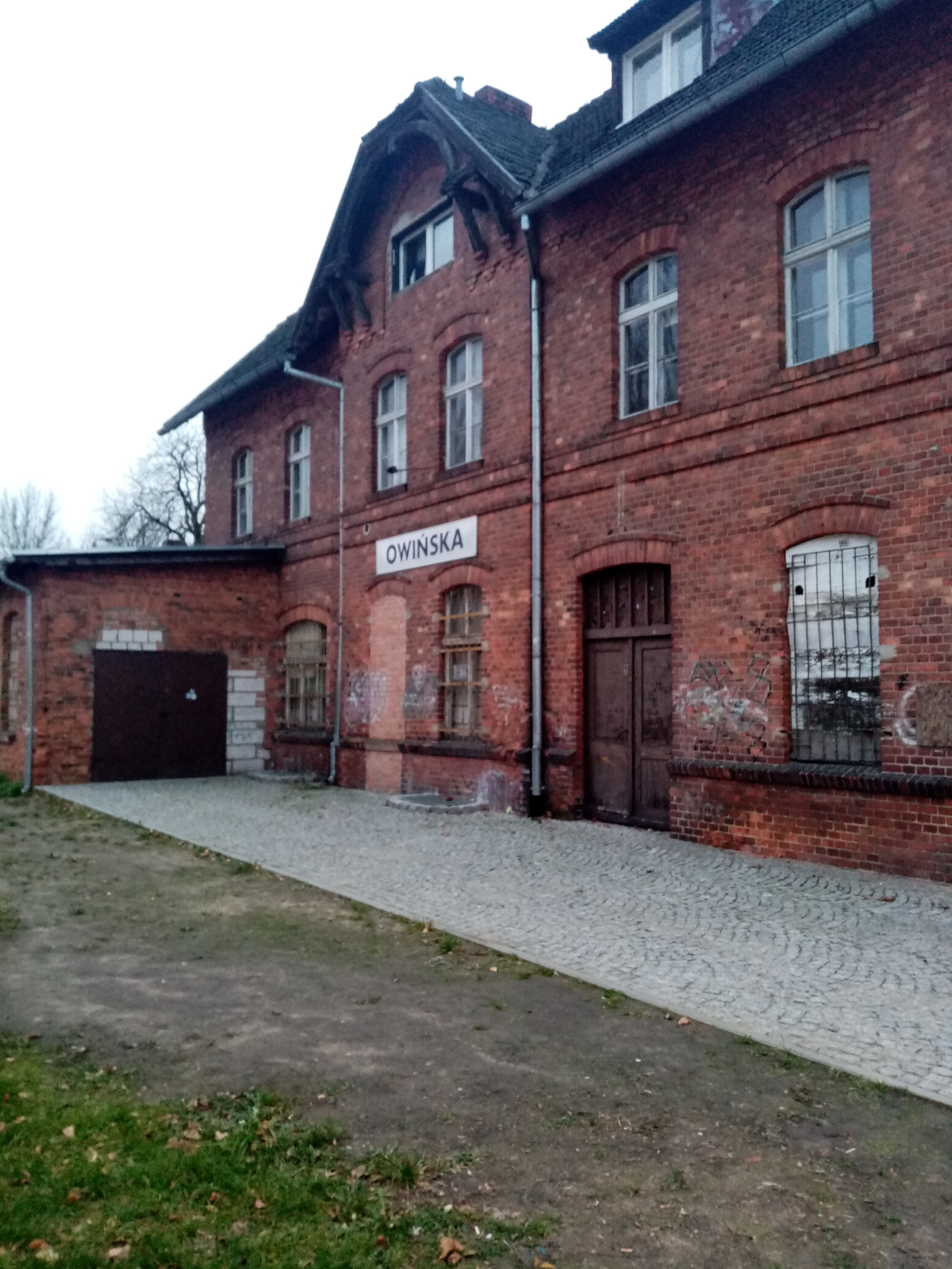 stacja kolejowa Owińska